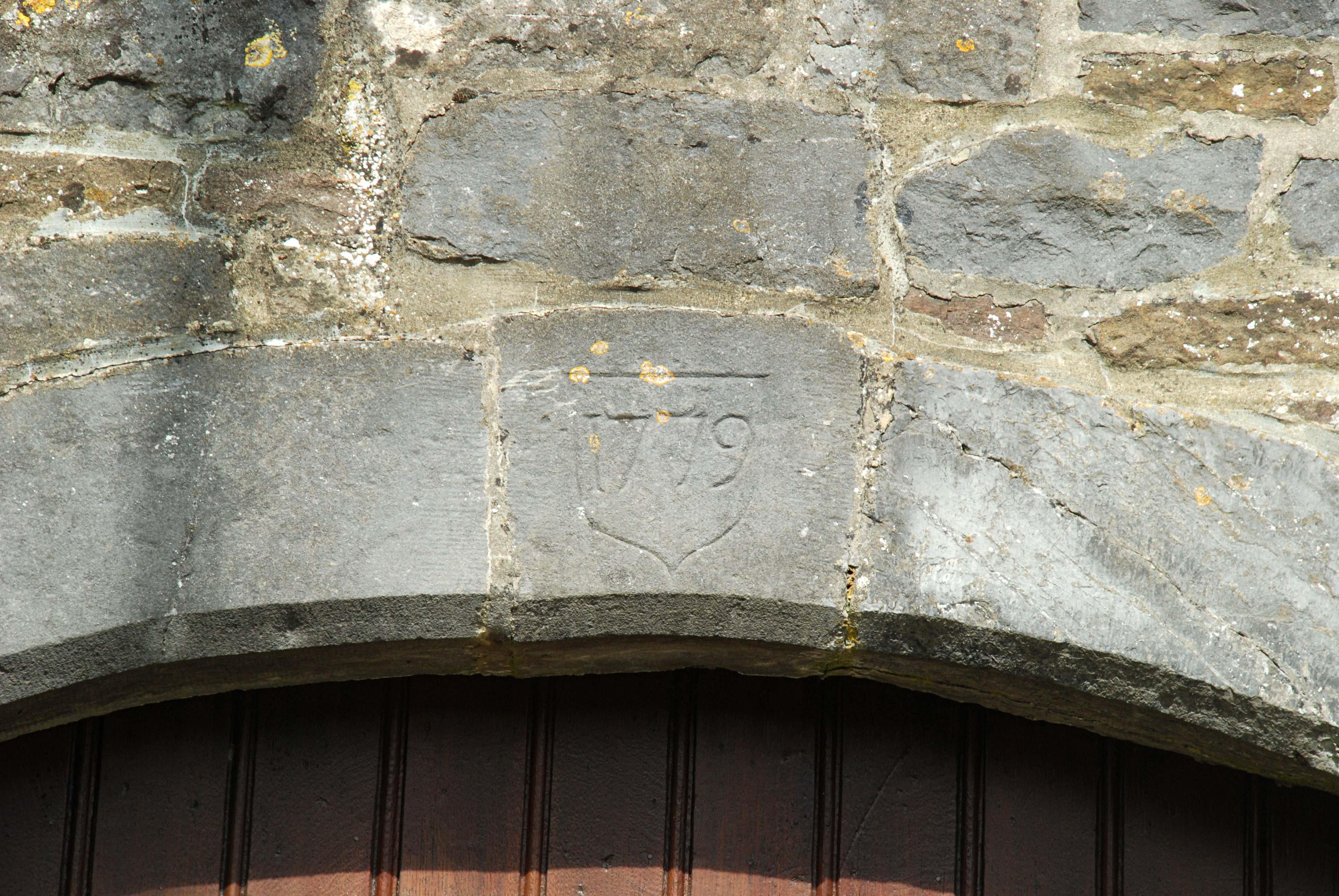 Belgique - Province de Namur - Maillen - Église Saint-Martin d'Ivoy